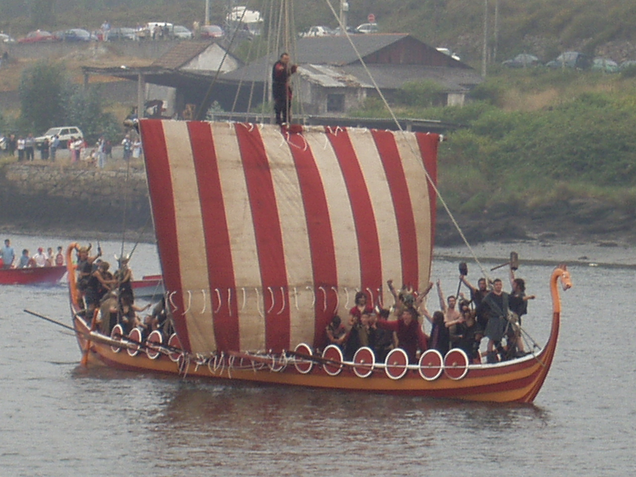 Barco viquingo festa Catoira